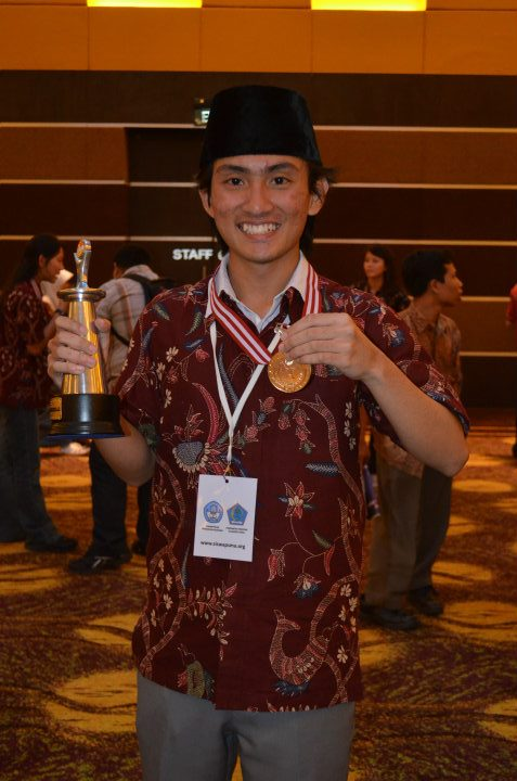 Bintang Rahmat Wananda - medali emas OSN 2011